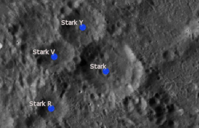 Cráter lunar Stark. Cráteres satélite. (Imagen LRO)